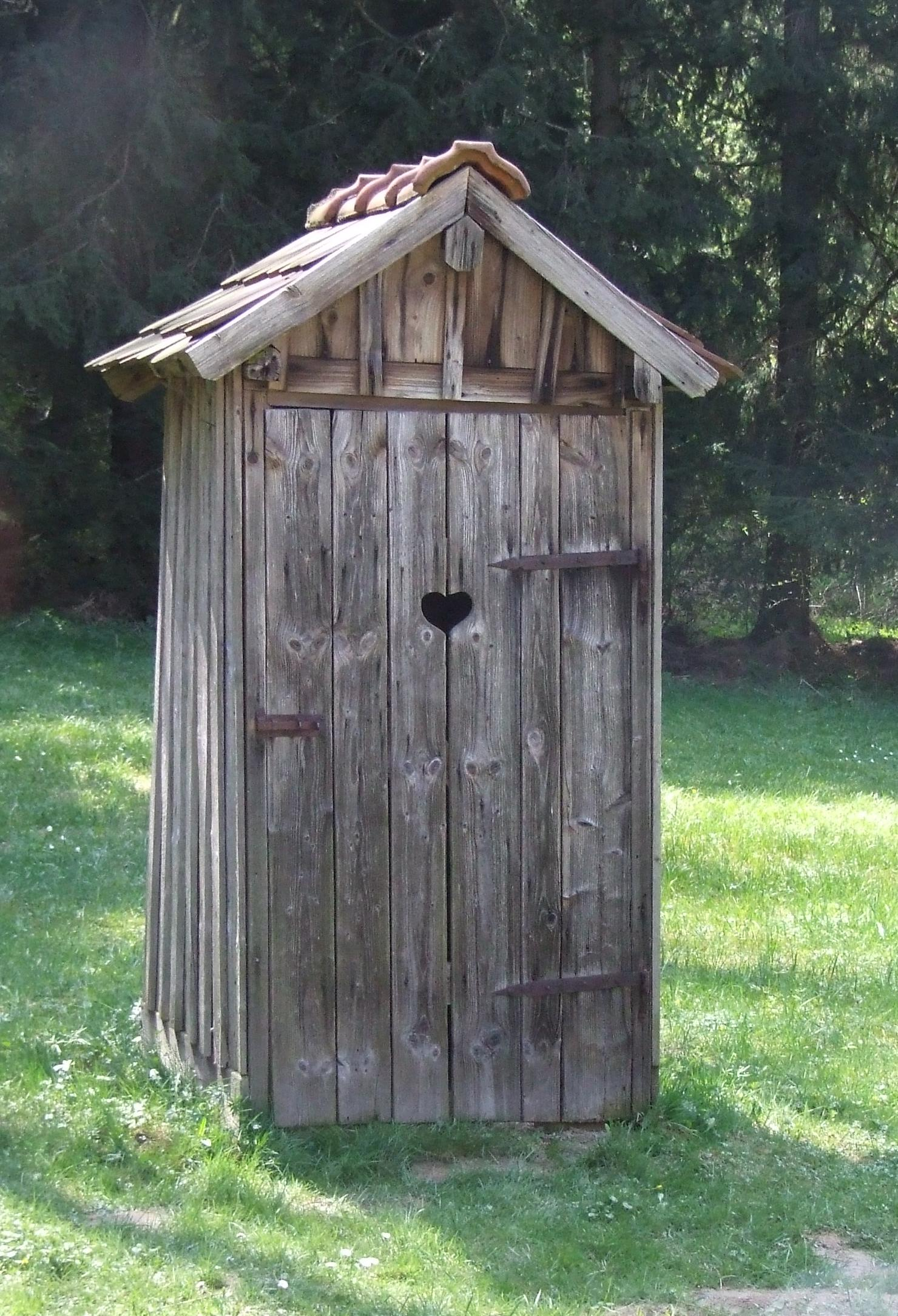 Schwäbisches Plumpsklo vor dem "Staudenhaus" in Oberschönenfeld (Schwäbisches Volkskundemuseum beim Kloster Oberschönenfeld).